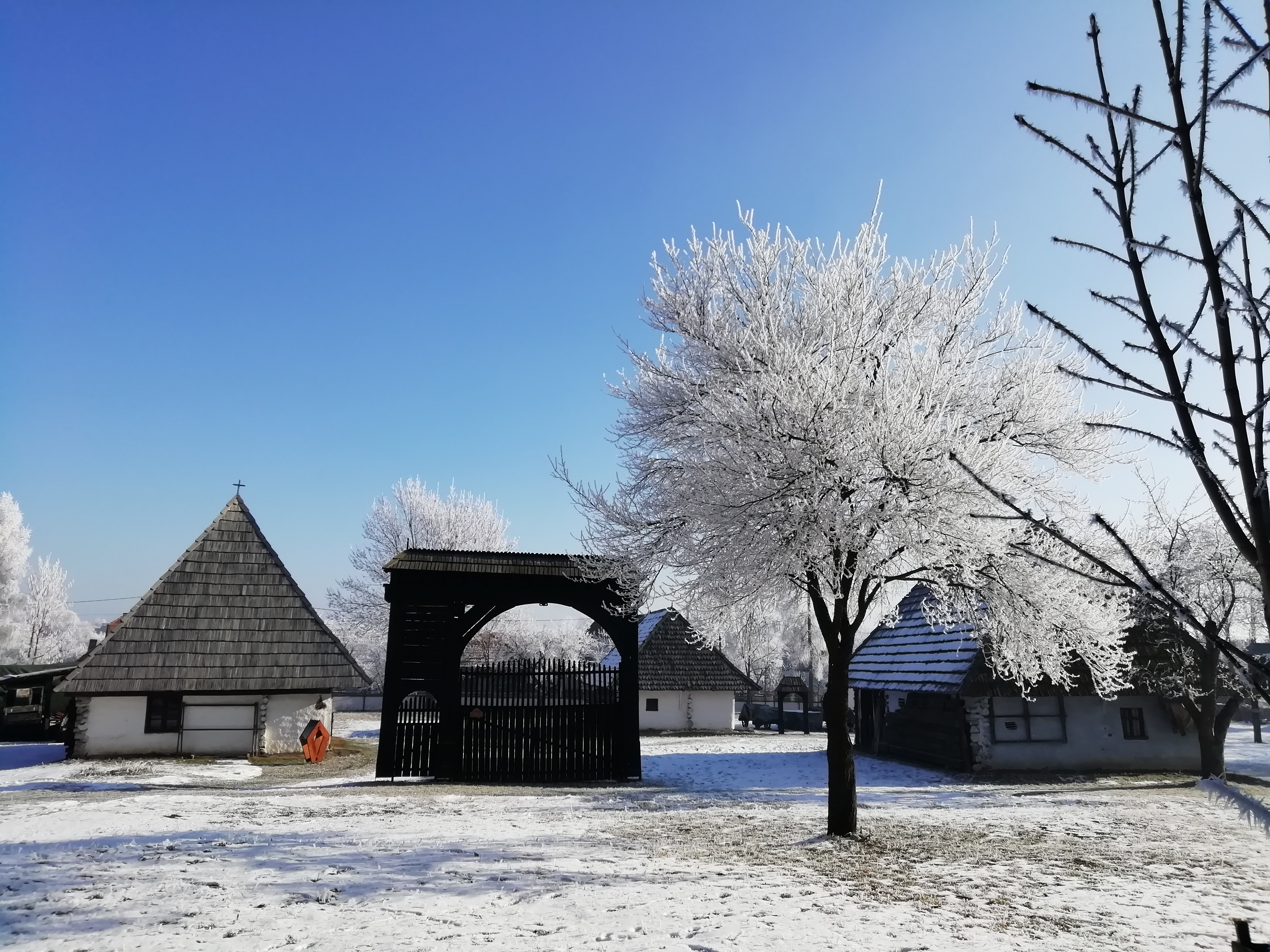 A Haszmann Pál Múzeum szabadtéri része.